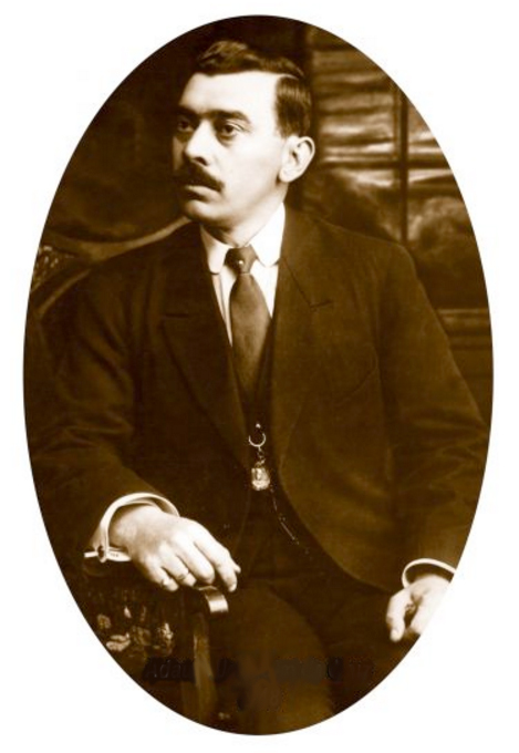 Adauto Joaquim da Cruz